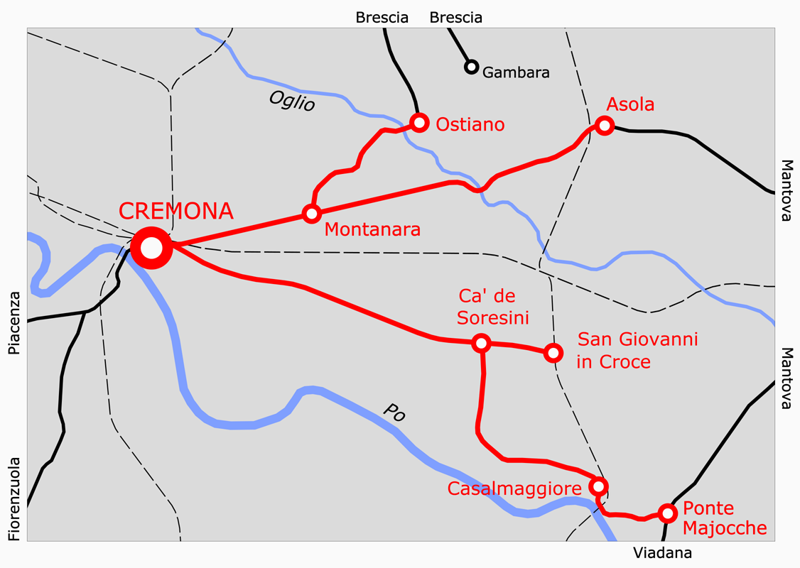 La rete tranviaria provinciale di Cremona